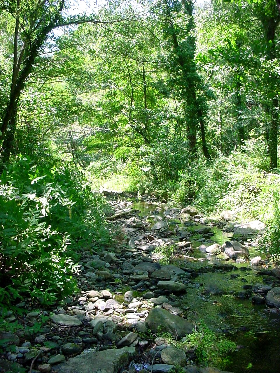 Cours de l'Ample, affluent du Tech dans les Pyrénées-Orientales